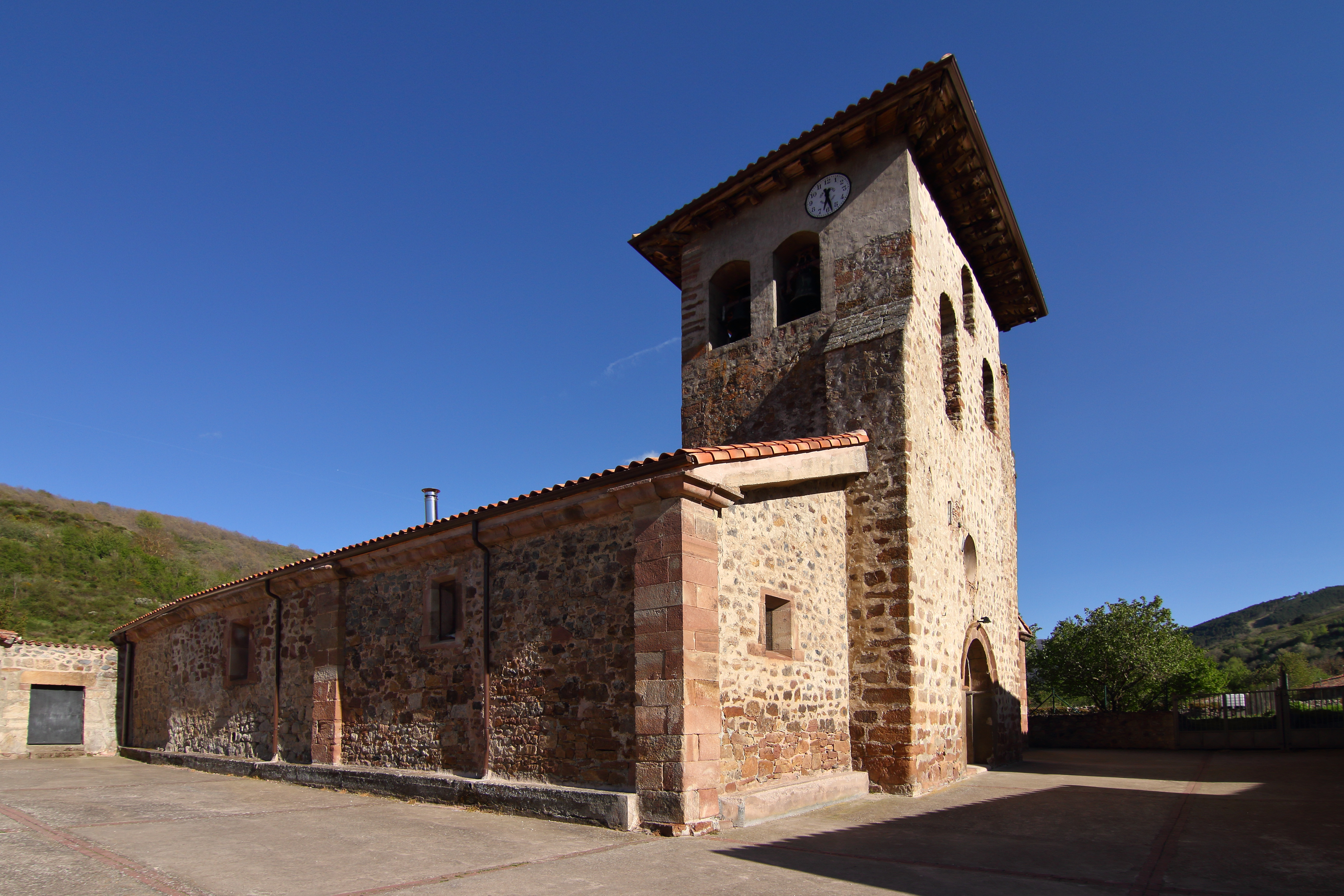 Santa Cruz del Valle Urbión, Iglesia de Nuestra Señora, 01